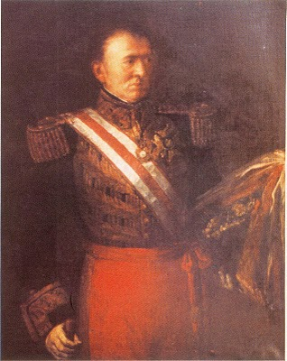 Retrato de 1843 de Antonio de Quintanilla.